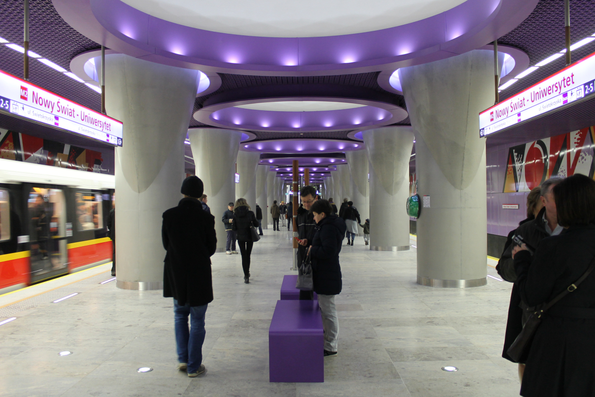 Peron stacji C12 Nowy Świat-Uniwersytet.